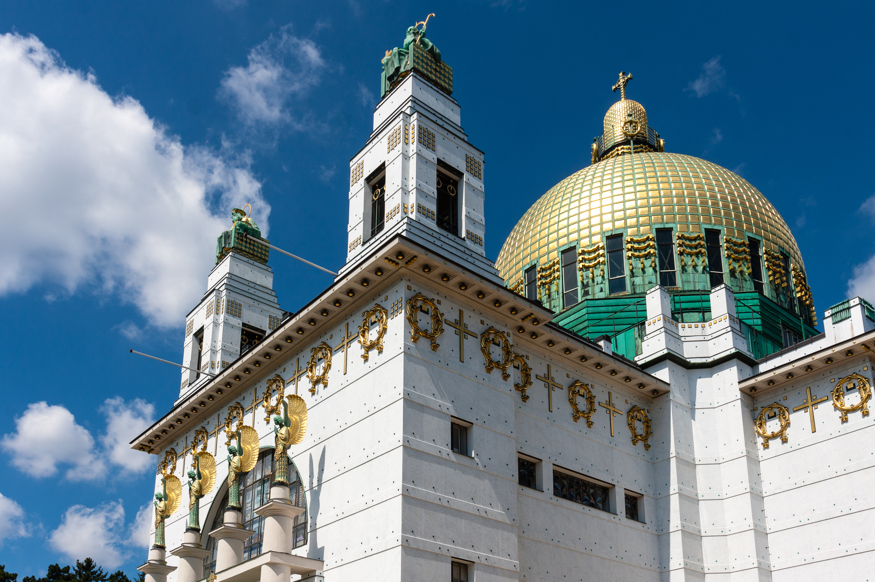 Otto Wagner Kirche - Am Steinhof